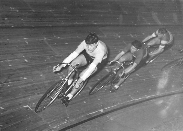 Konrad Nentwig, Harry Seidel Zentralbild Bey-Wen 24.1.1958 Winterbahn-Premiere der Radamateure In der Berliner Werner Seelenbinder-Halle fand am Donnerstag, dem 23.1.1958, die winterbahn-Premiere der Radamateure statt. UBz: Während eines 30-Runden-Punktefahrens um den "Großen Preis der Berliner Zeitung".Der spätere Sieger Konrad Nentwig (Post Berlin) führt vor dem Zweitplazierten Harry Seidel (Semper Berlin).